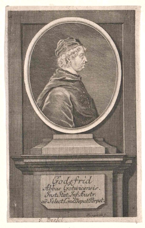 Gottfried Bessel (1672-1749), Benediktiner, Abt von Göttweig, stammte aus Buchen im Odenwald